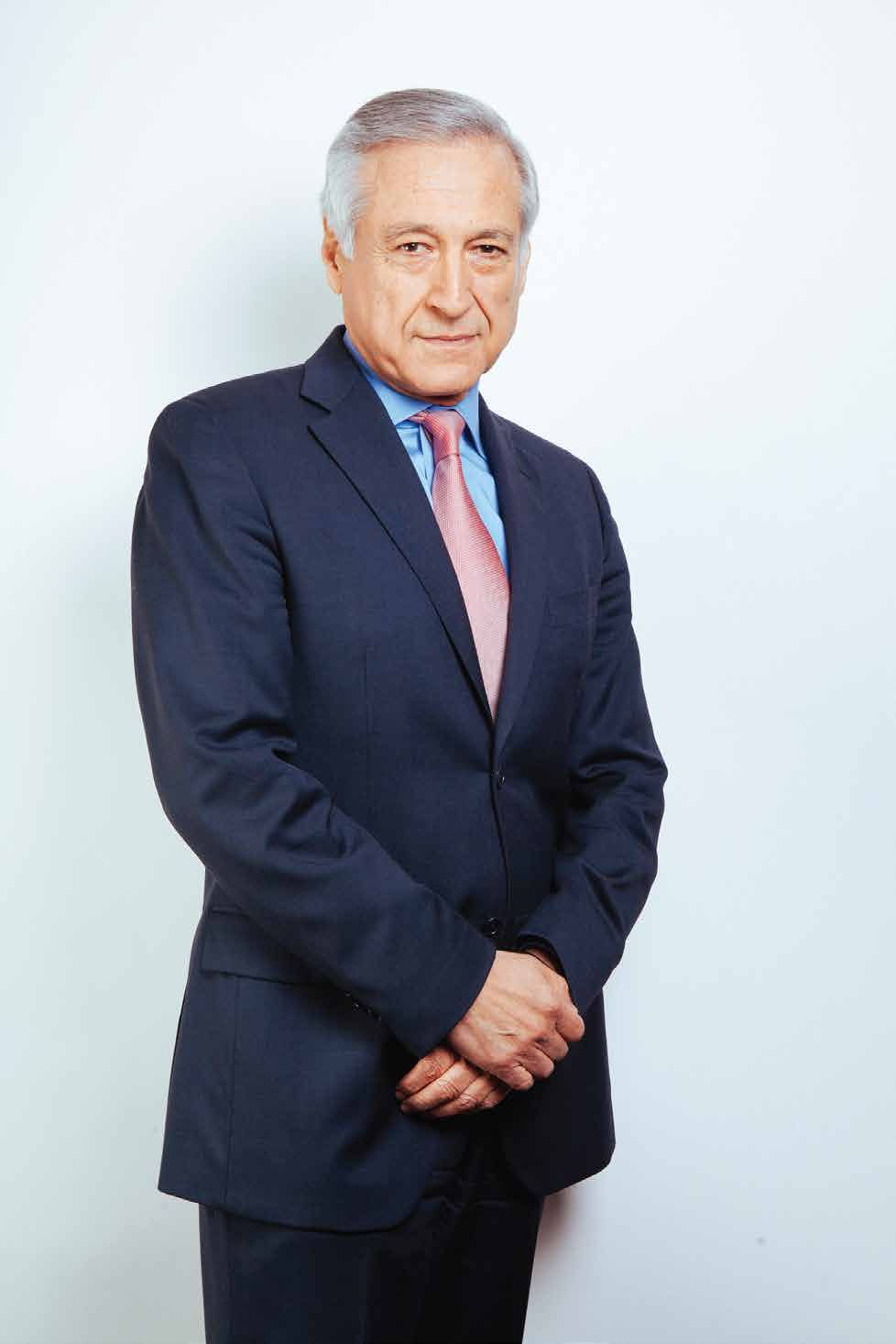 Ministro de Estado del segundo gobierno de Michelle Bachelet (2014-2018)